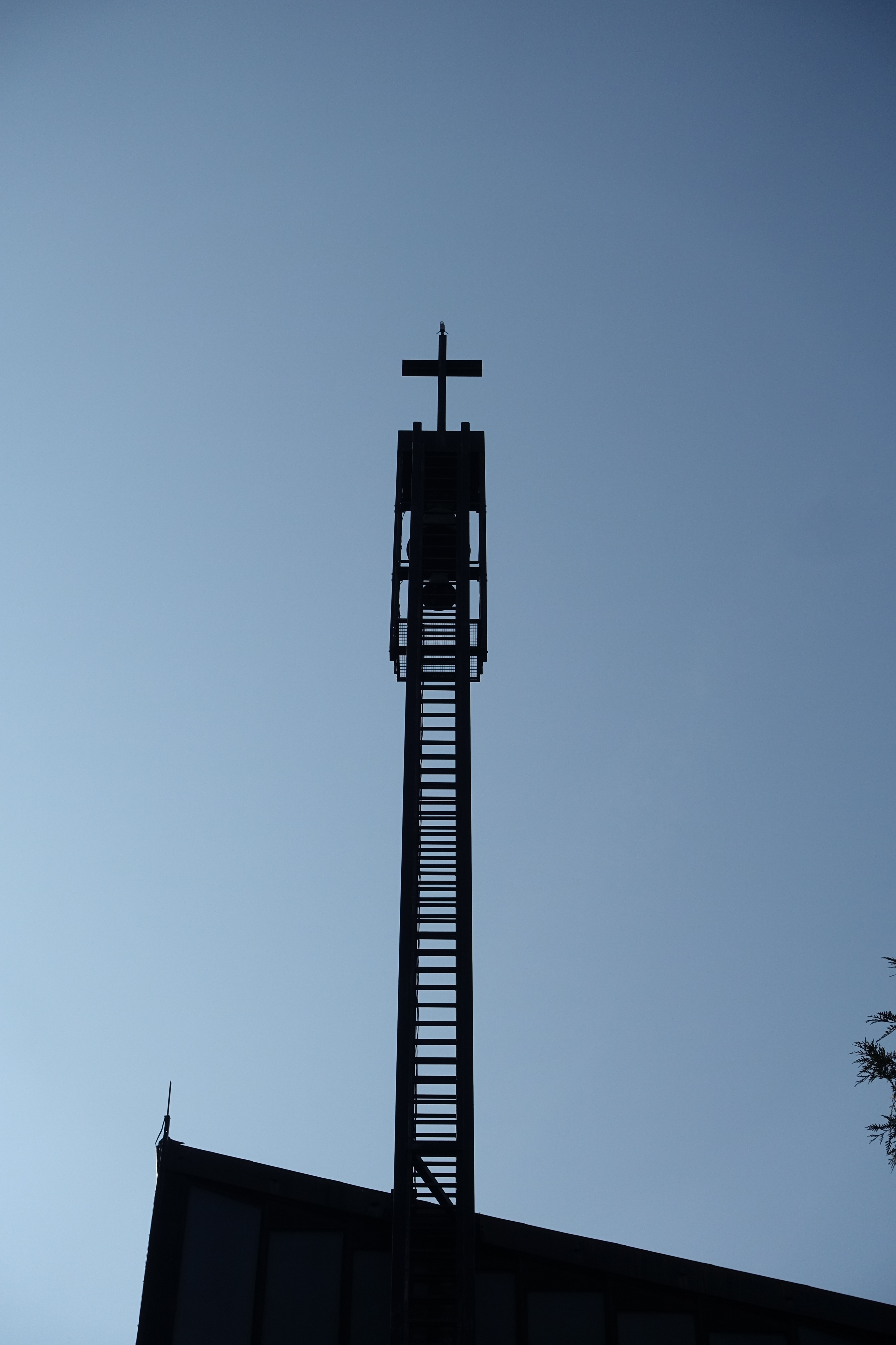 Cross @ Eglise Saint-Eloi @ Paris 12